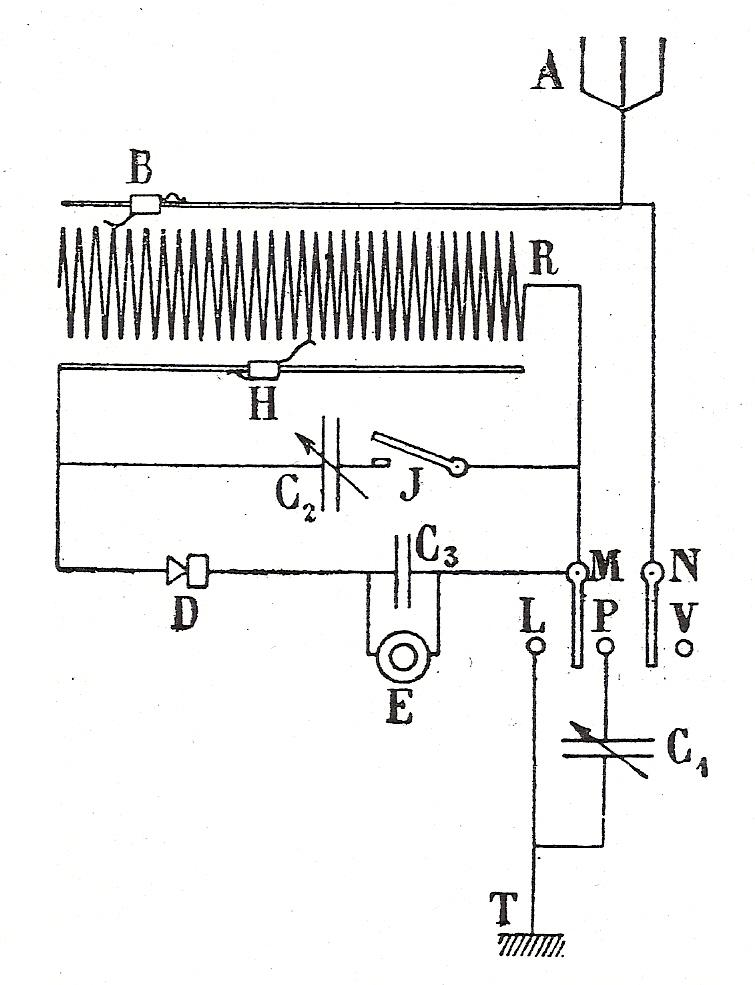 Poste a galène Oudin pour l'écoute de la bande 30 kHz à 40 MHz (8 à 10000 mètres).